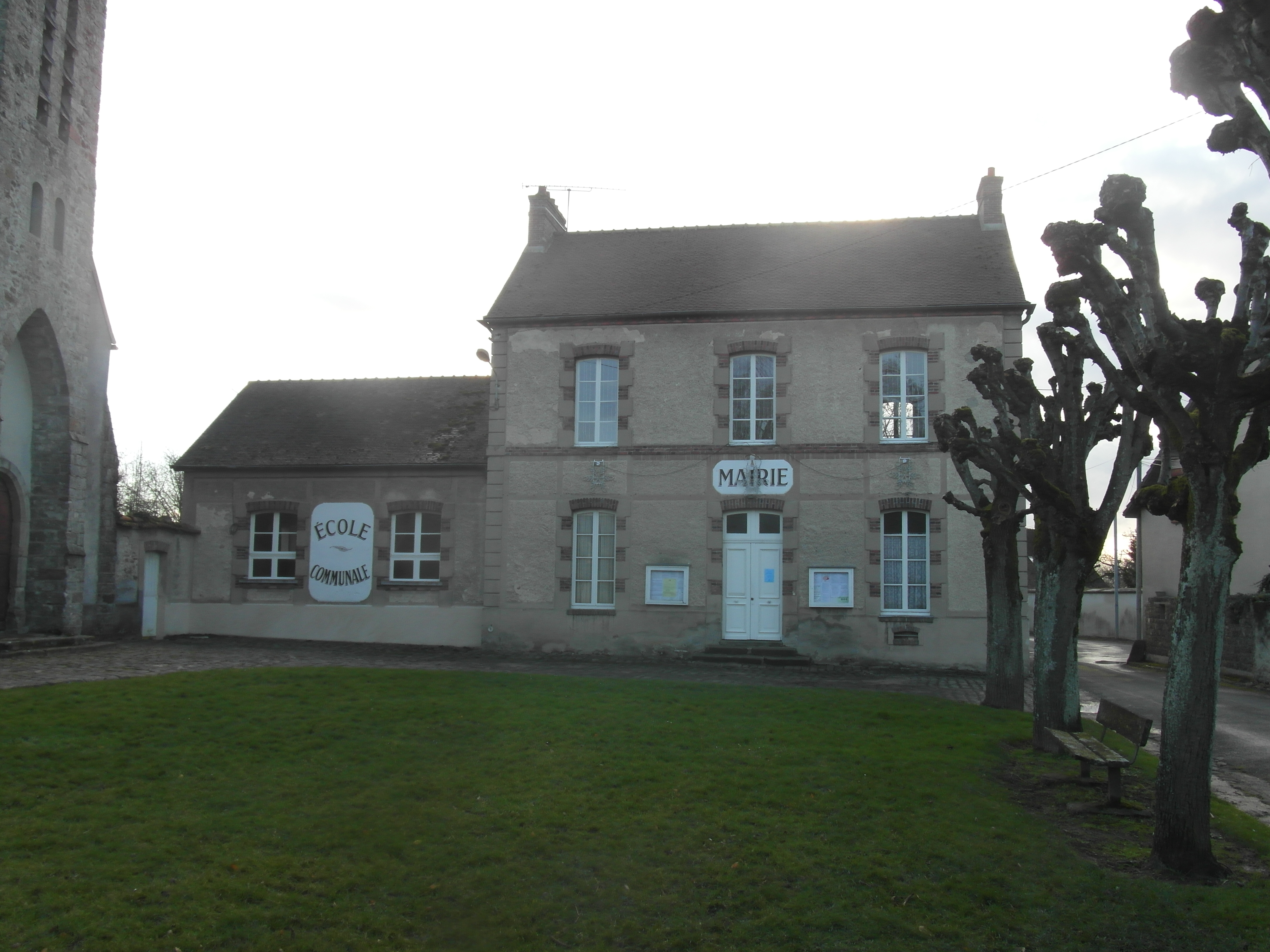 Mairie de Beauvoir (Seine-et-Marne)